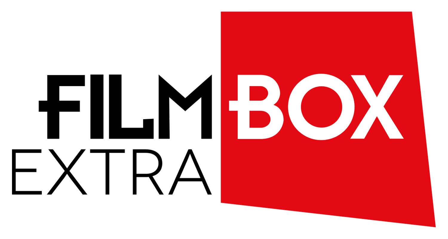 ghhgh